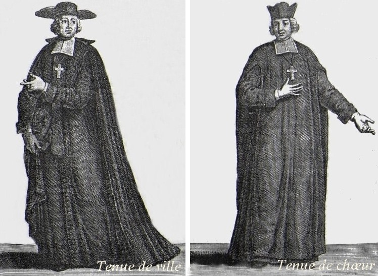 Gravure du début du XVIIIe siècles représentant un moine noble de l'abbaye de Saint-Claude (dans le département actuel du Jura) en tenue de ville et en tenue de chœur. Illustrations figurant dans Histoire de l'abbaye et de la terre de Saint-Claude par Dom Paul Benoît, Montreuil-sur-Mer, 1892,p. 570 et 598. [1]